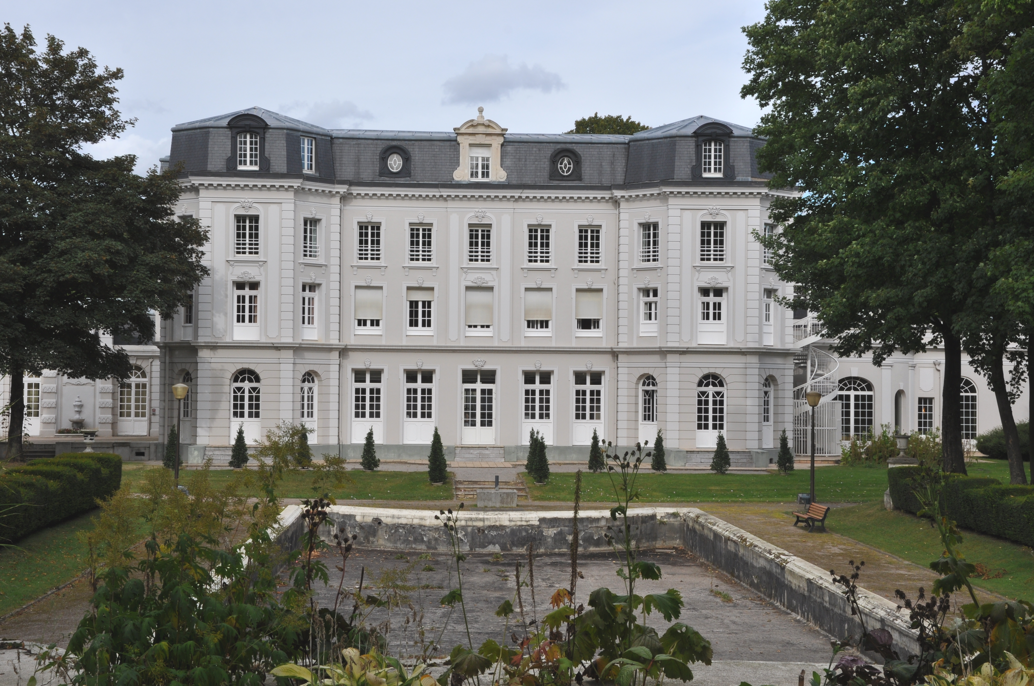 Le château Mercier était la résidence de l'ingénieur-directeur de la Compagnie des mines de Béthune dans le bassin minier du Nord-Pas-de-Calais, à Mazingarbe, Pas-de-Calais, Nord-Pas-de-Calais, France. Il est inscrit aux monuments historiques le 9 octobre 2009 et inscrit sur la liste du patrimoine mondial par l'Unesco le 30 juin 2012 et y constitue en partie le site no 81. .